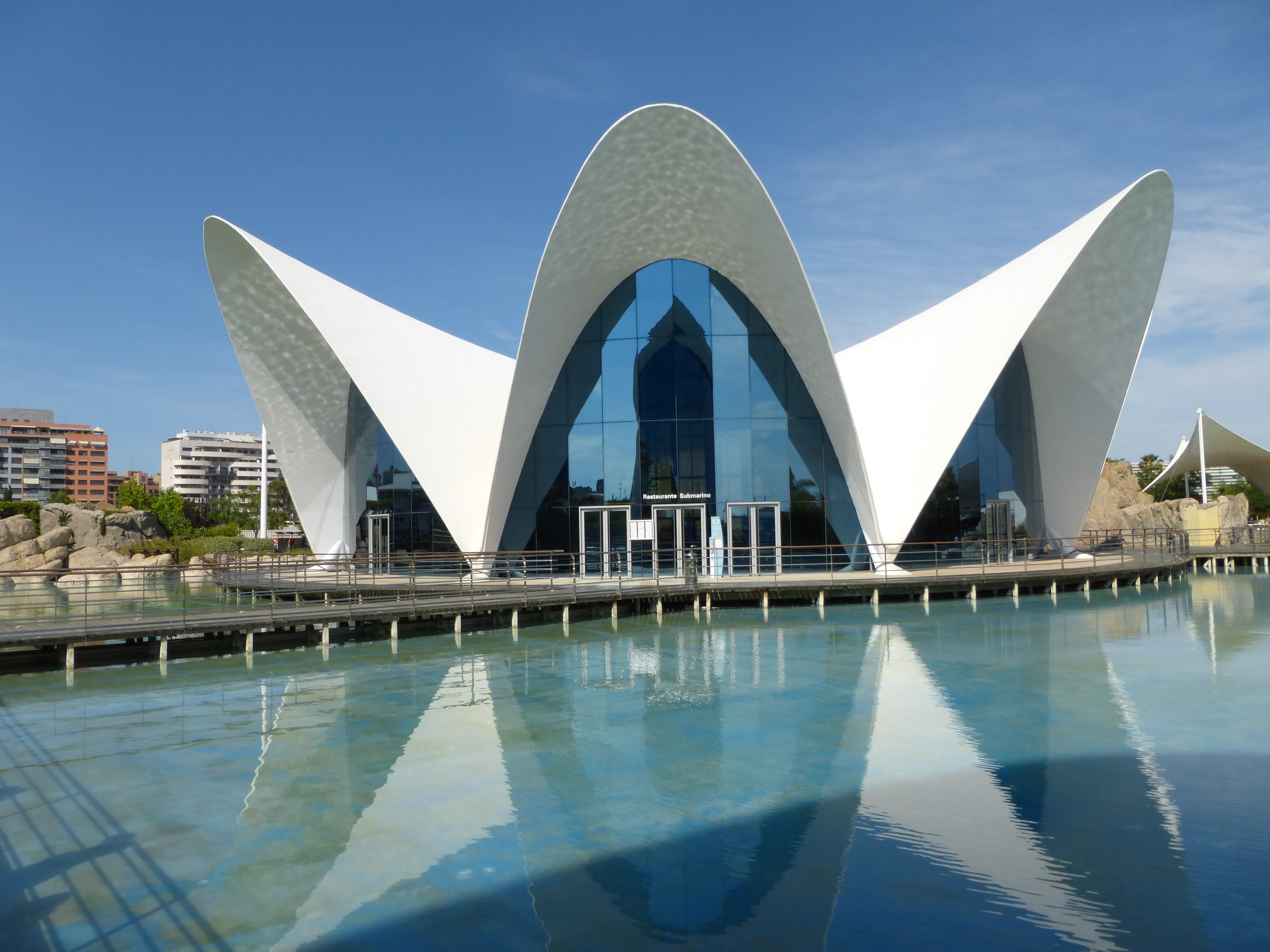 "l 'oceanographic " a valence